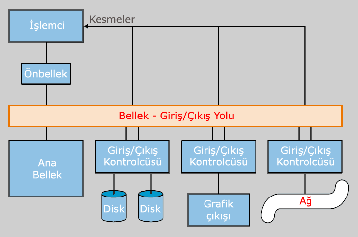 Bilgisayar alyıtlarının birbirleriylr bağlantıları